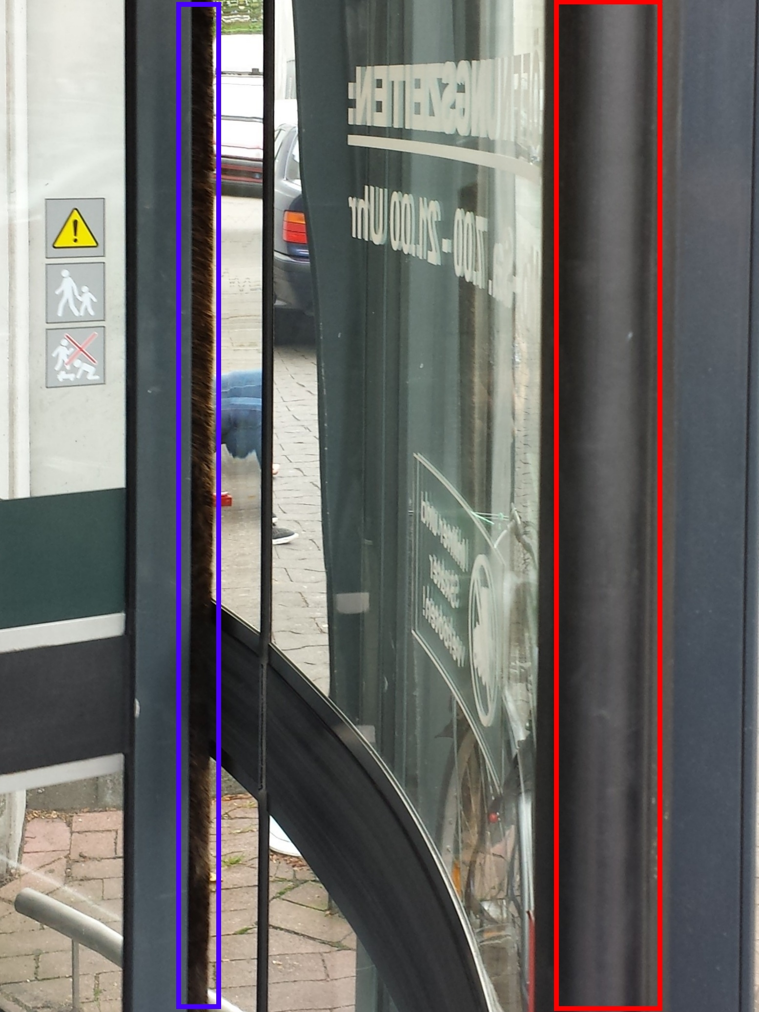 Kontaktschaltleiste (roter Rahmen) an der Gegenkante einer Karüsseltür.